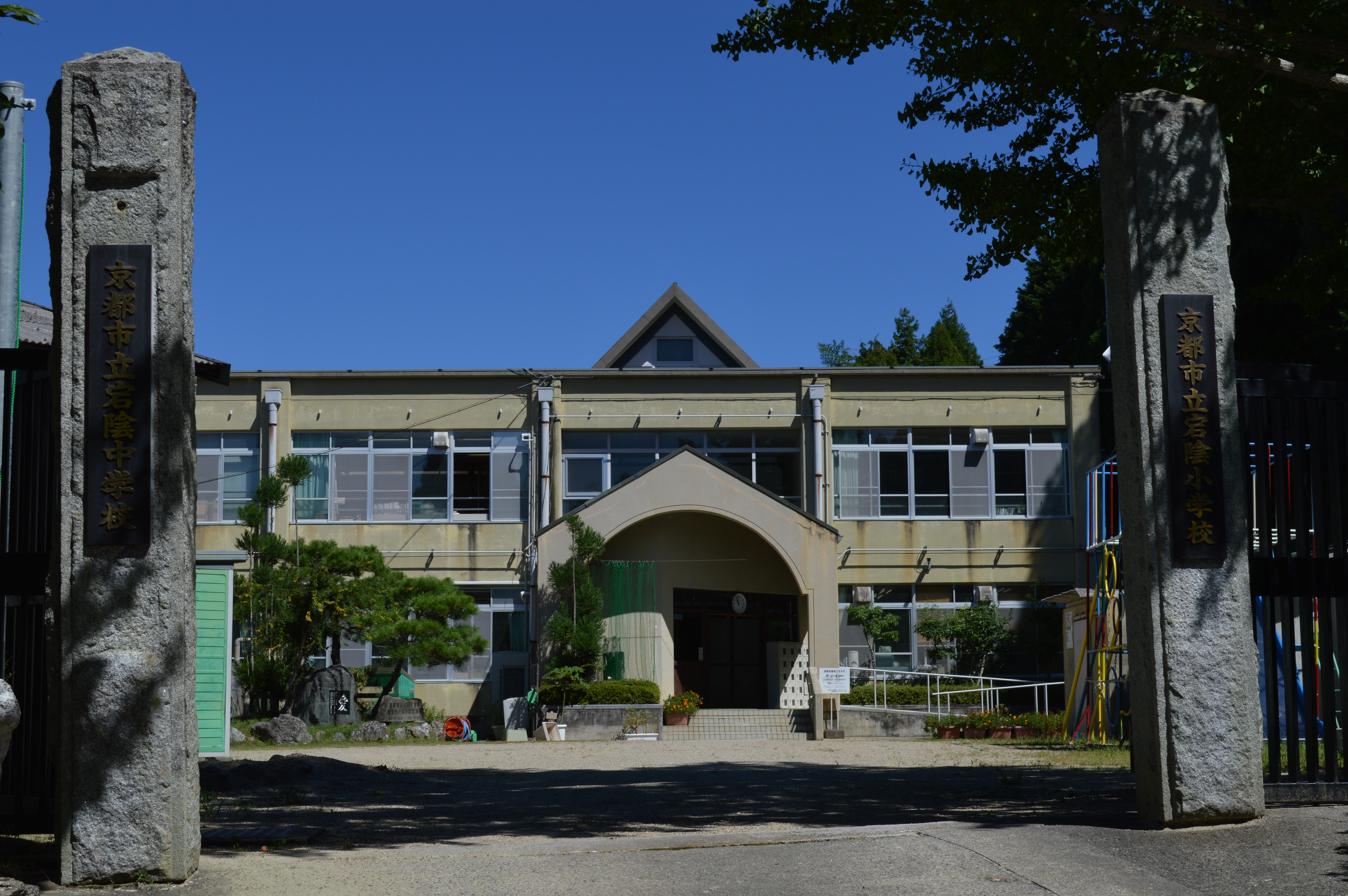 京都市右京区嵯峨越畑にある宕陰小中学校